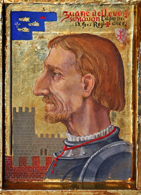 Autoritratto di Mirko Vucetich. Olio su tavola.